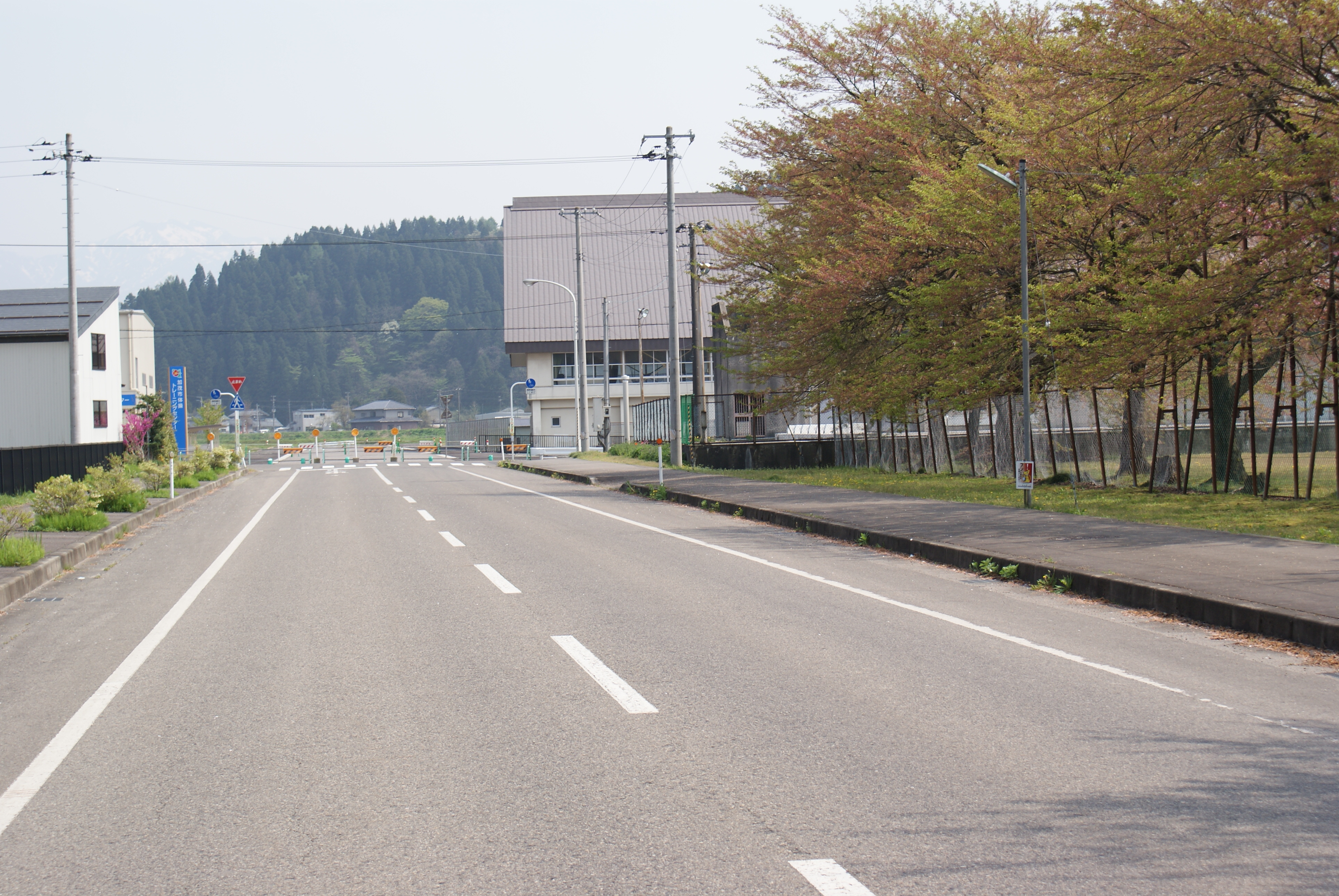 旧蒲原鉄道駒岡駅跡。プール脇の辺りが駅跡。この道路は廃線跡を拡幅したもの。